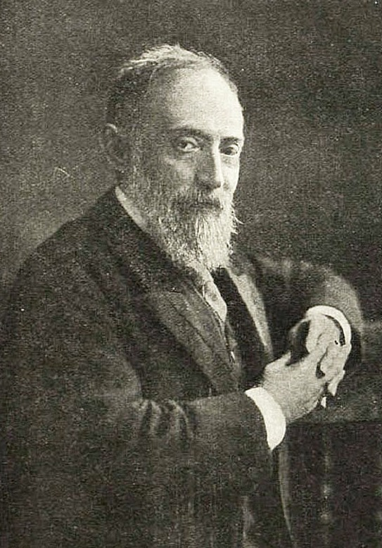 Kiss József magyar költő, szerkesztő.